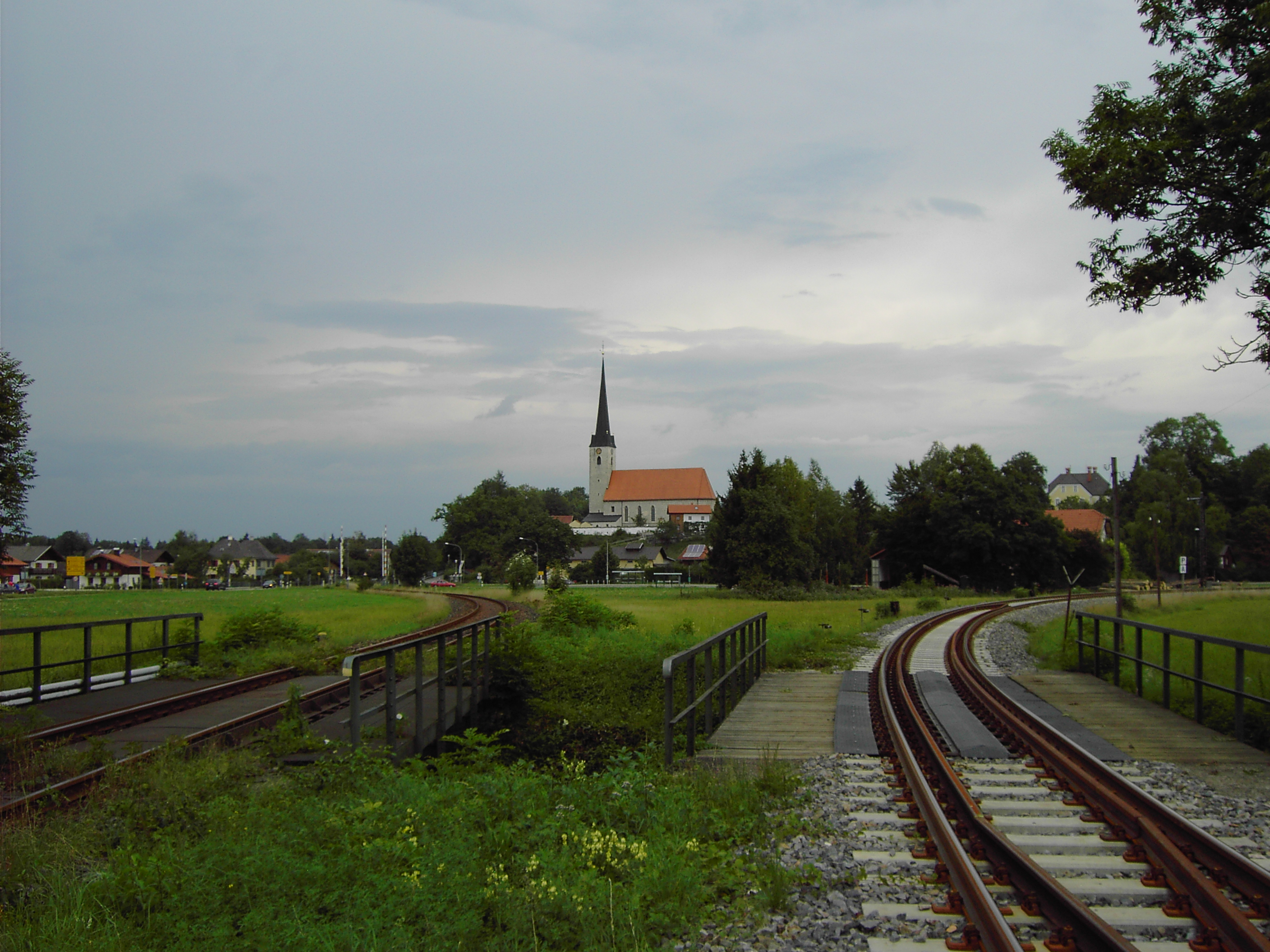 St Georgen